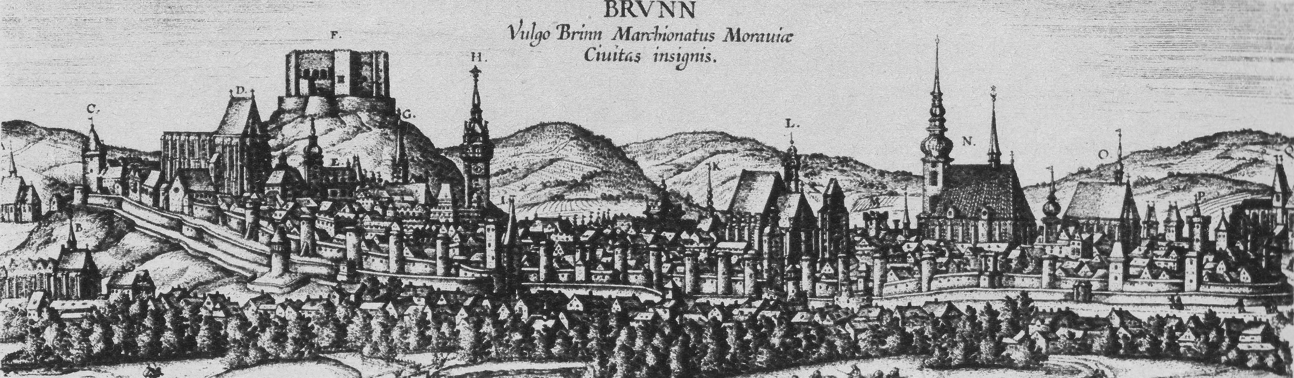 Rytina zobrazující Brno v roce 1617.